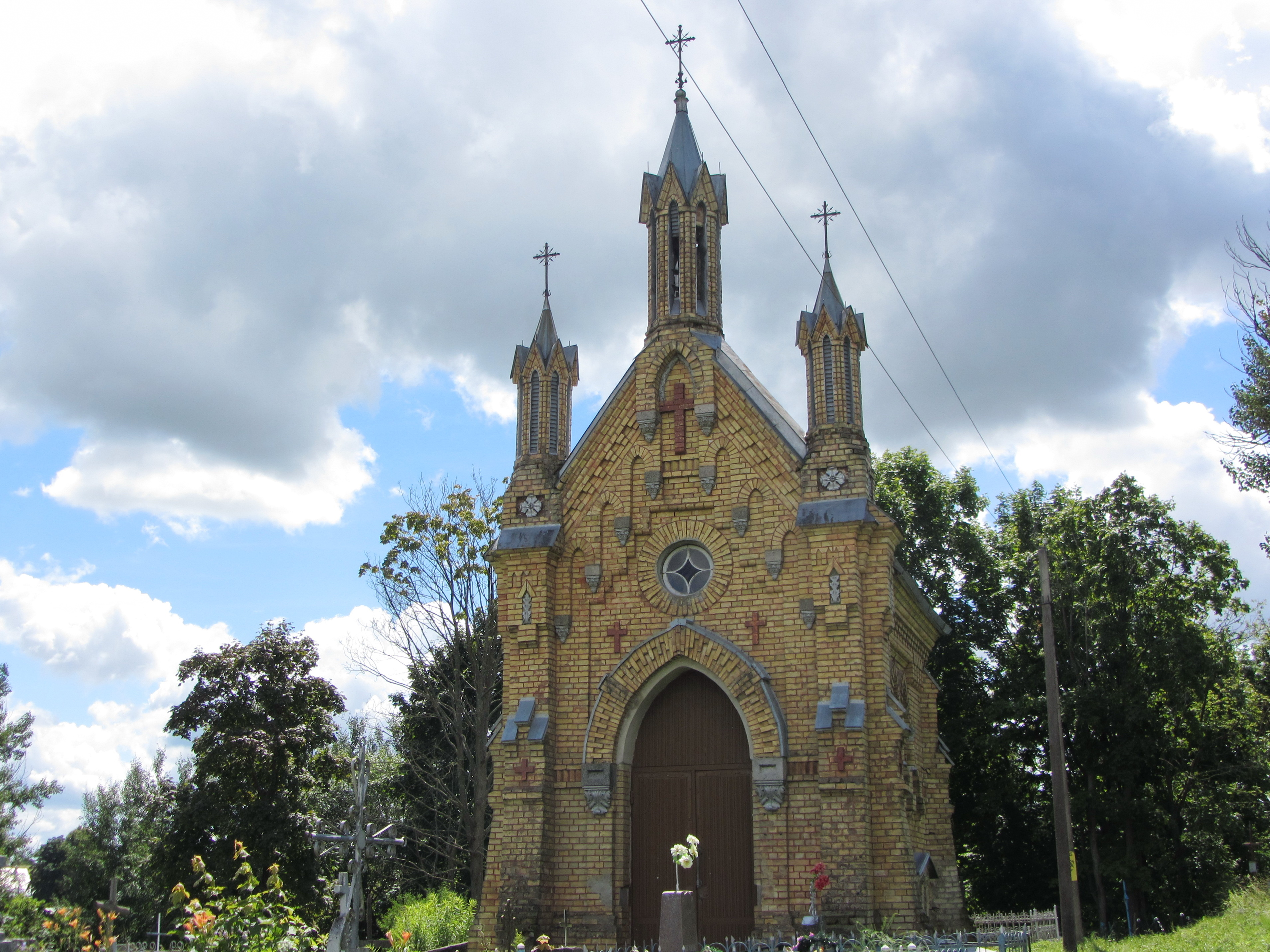 Беларуская (тарашкевіца): Каталіцкая капліца-пахавальня ў вёсцы Лебедзева (Мададэчанскі раён)